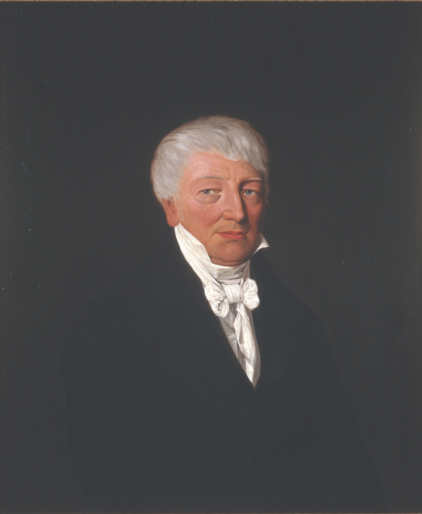 Portrett av Alexander Christian Møller. Dr regimentkirurg, brystbilde på lerret, sort drakt med hvitt kalvekryss, kort, hvitt hår.